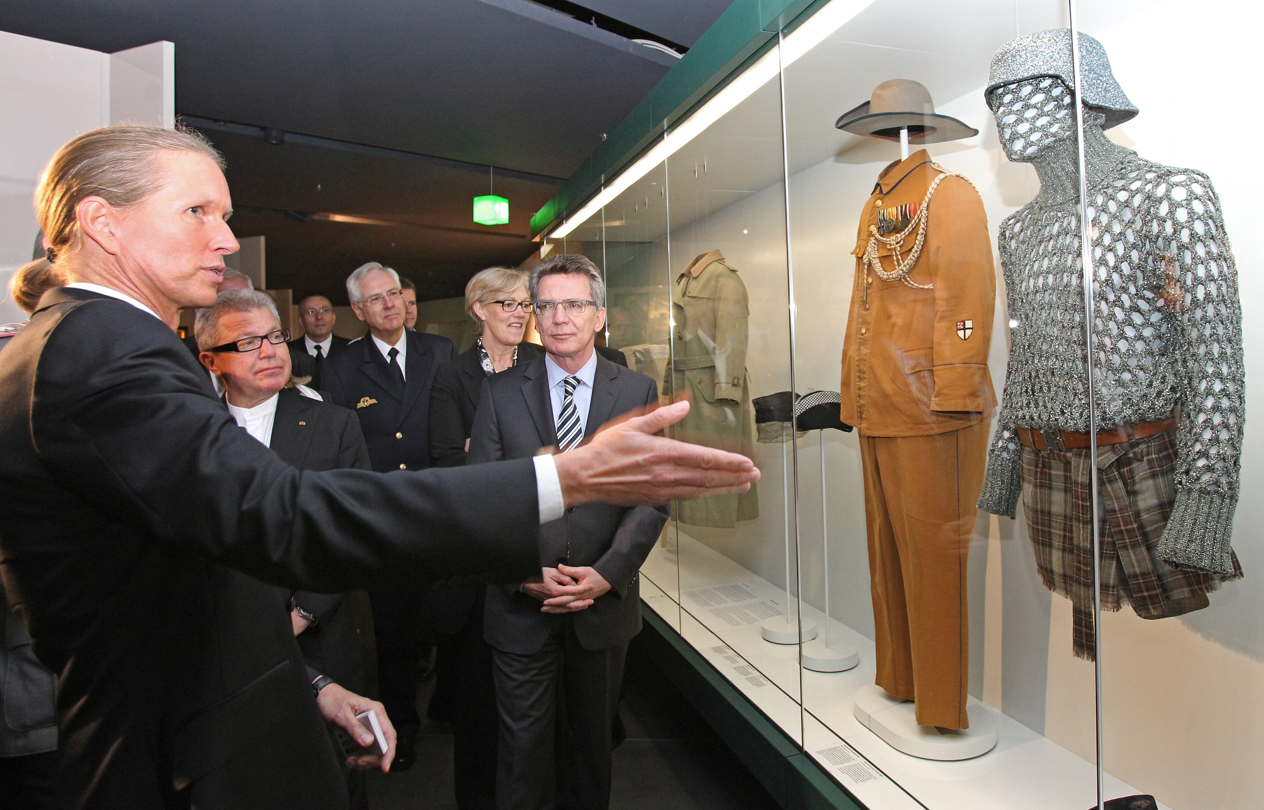 Nach einer siebenjährigen Umbauzeit wird das Militärhistorische Museum der Bundeswehr in Dresden am 14. Oktober 2011 neu eröffnet. Das Museum ist mit über 10500 in der Dauerausstellung gezeigten Exponaten auf 19.000 Quadratmetern Ausstellungsfläche eines der größten und modernsten militärhistorischen Museen Europas. Im Bild:Der wissenschaftliche Leiter des MHM Dr.phil.Gorch Pieken (links) führt den Architekten Daniel Libeskind (2.vl.) und den Bundesminister der Verteidigung, Dr.Thomas de Maizière durch den Themenpacour "Militär und Mode".